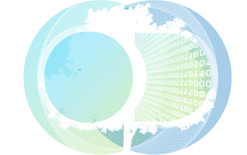 Logotipo para fondos de Open Data Euskadi